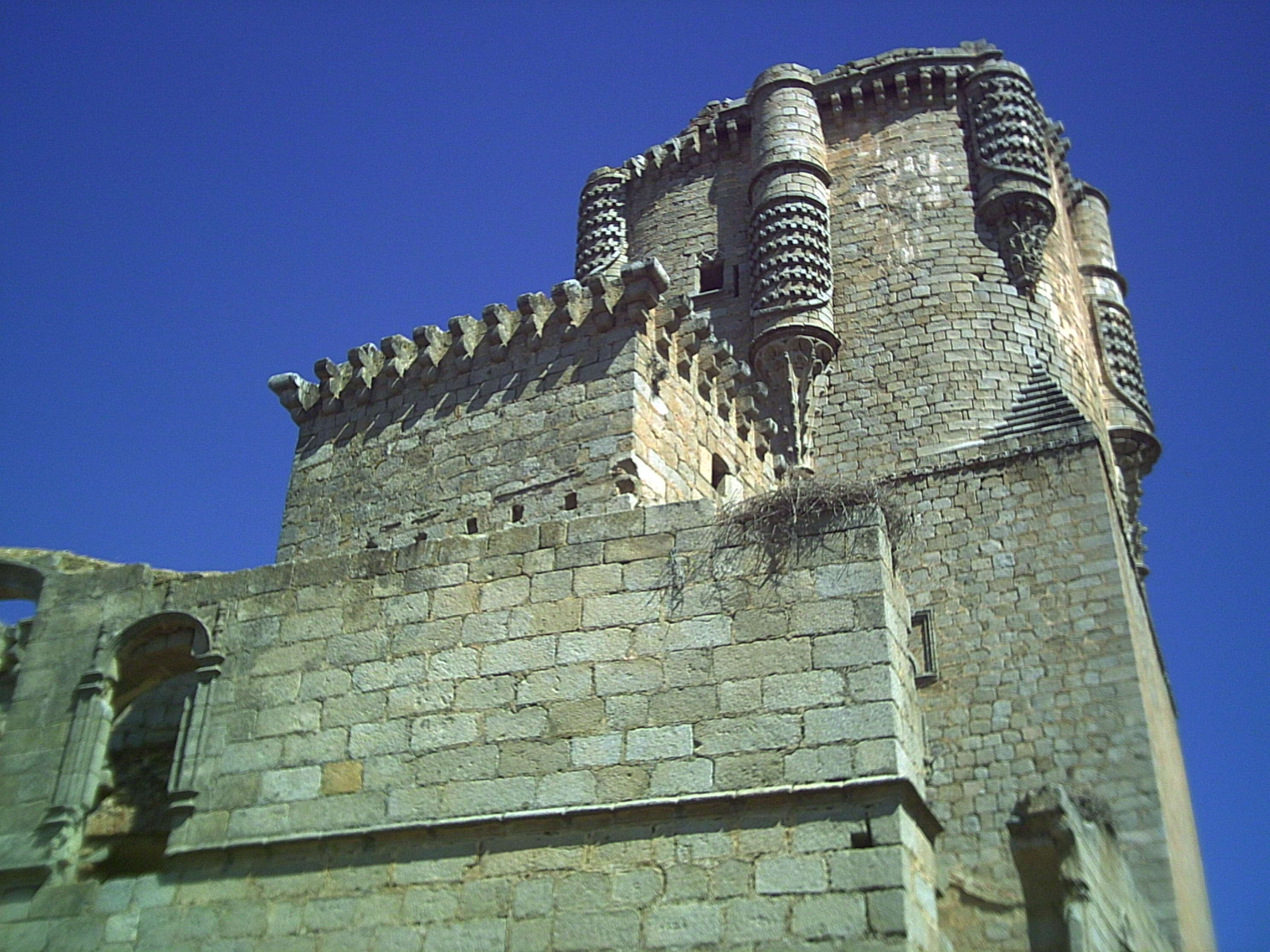 Detalle de la Torre del Homenaje del Castillo de los Sotomayor y Zúñiga en Belalcázar (Córdoba) (Andalucía) (España)